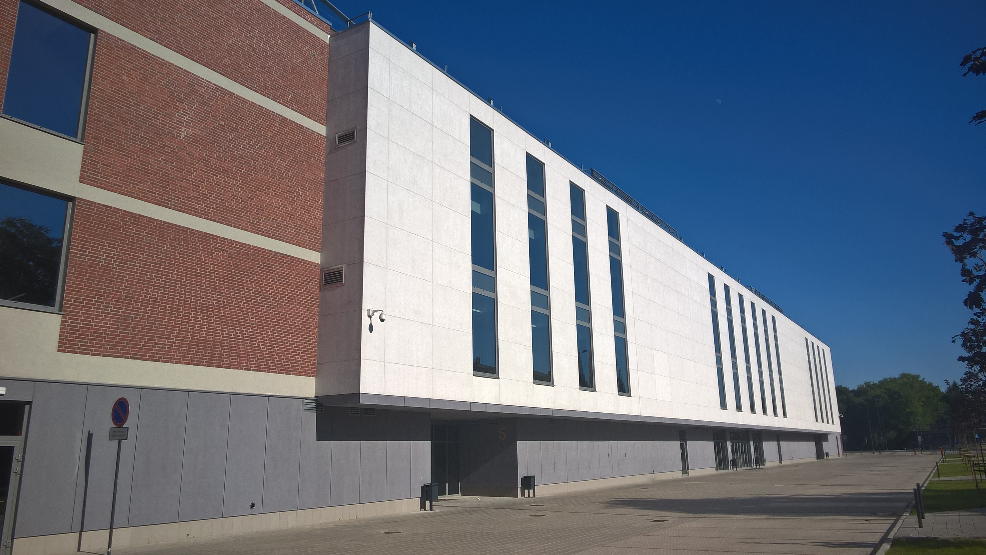 Nowy stadion Widzewa – trybuna A – wykusz (lipiec 2017)